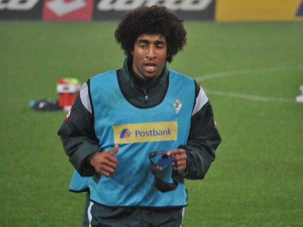 Dante vor dem Spiel gegen den 1. FC Kaiserslautern